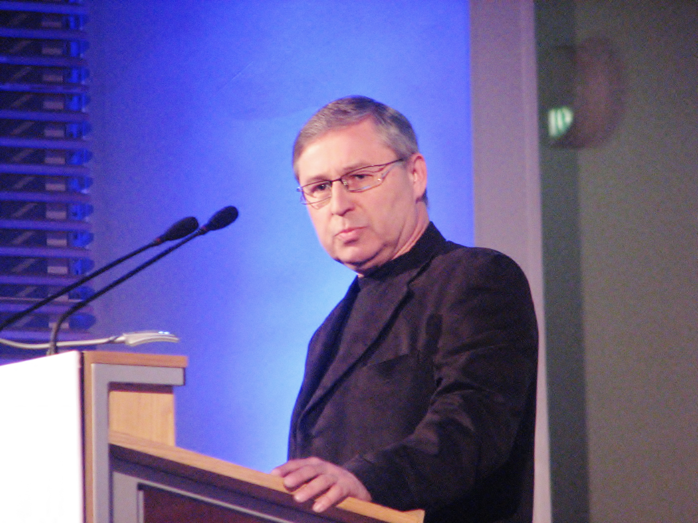 Avo Üprus esinemas IRLi suurkogul